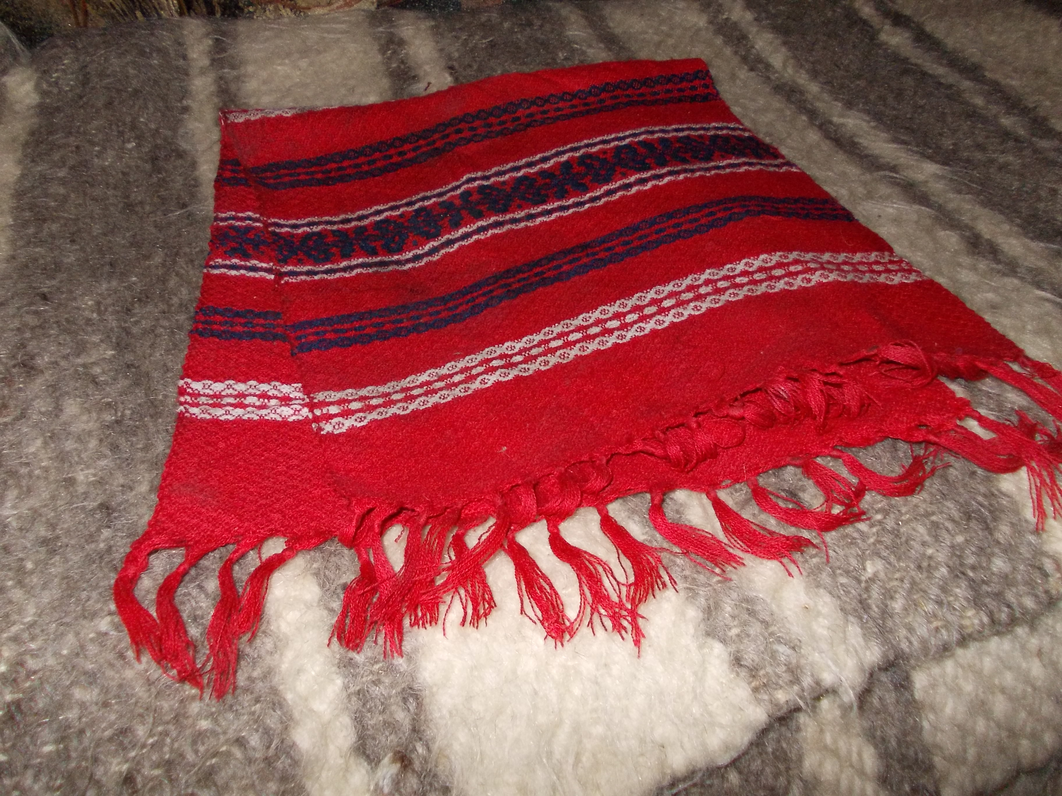 ştergar